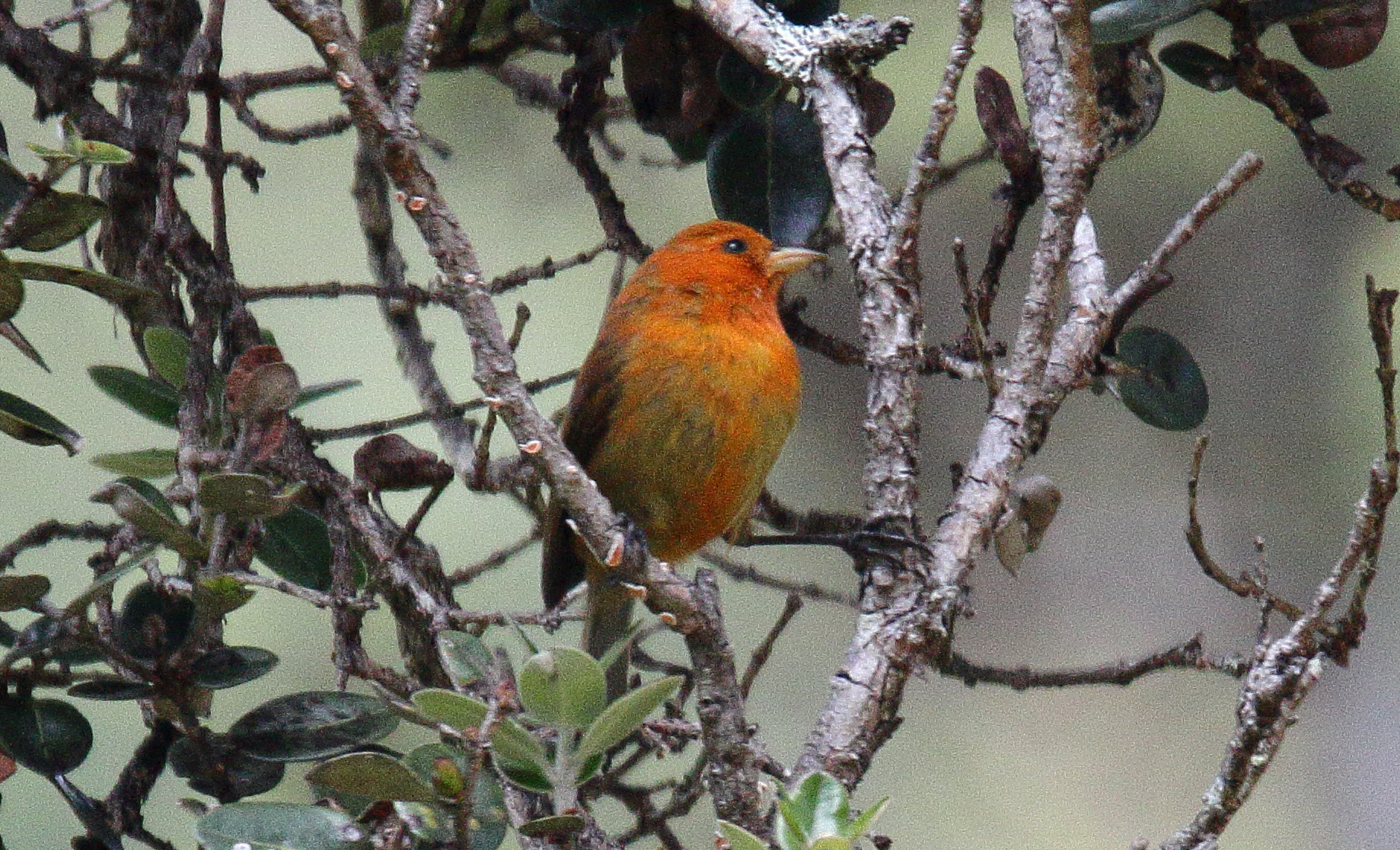 Hawaii Akepa (Loxops coccineus)